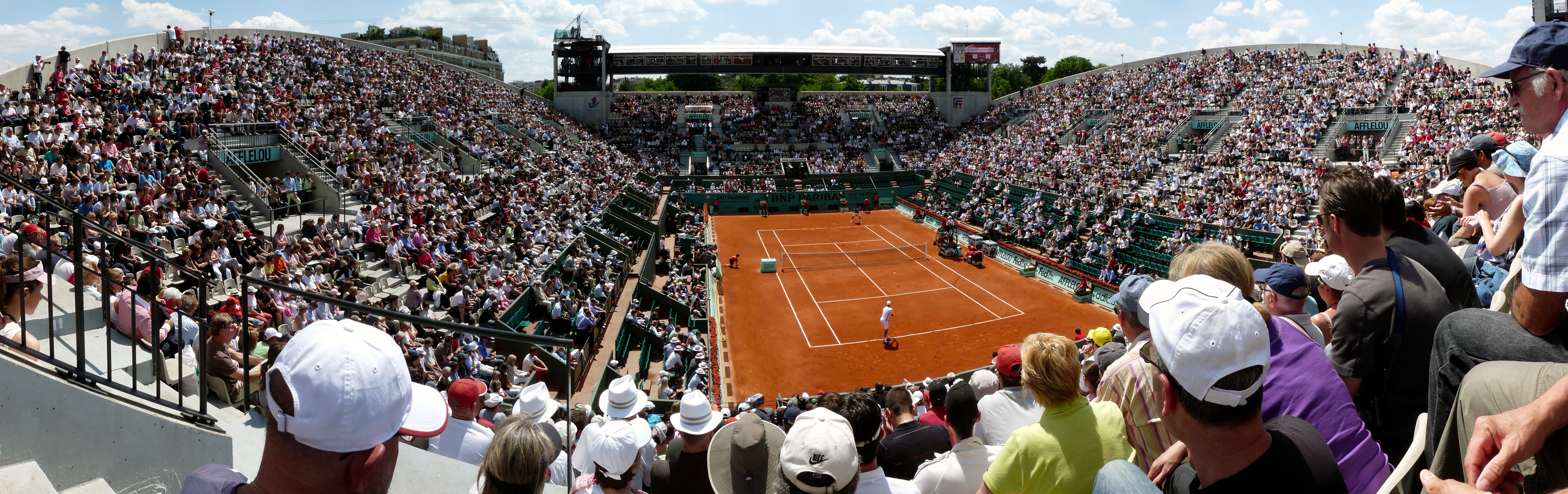 Court Suzanne Lenglen